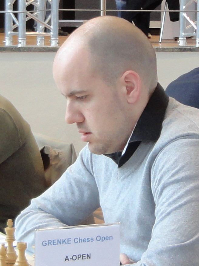 Marin Bosiocic, Grenke Chess Open 2016 in Karlsruhe.